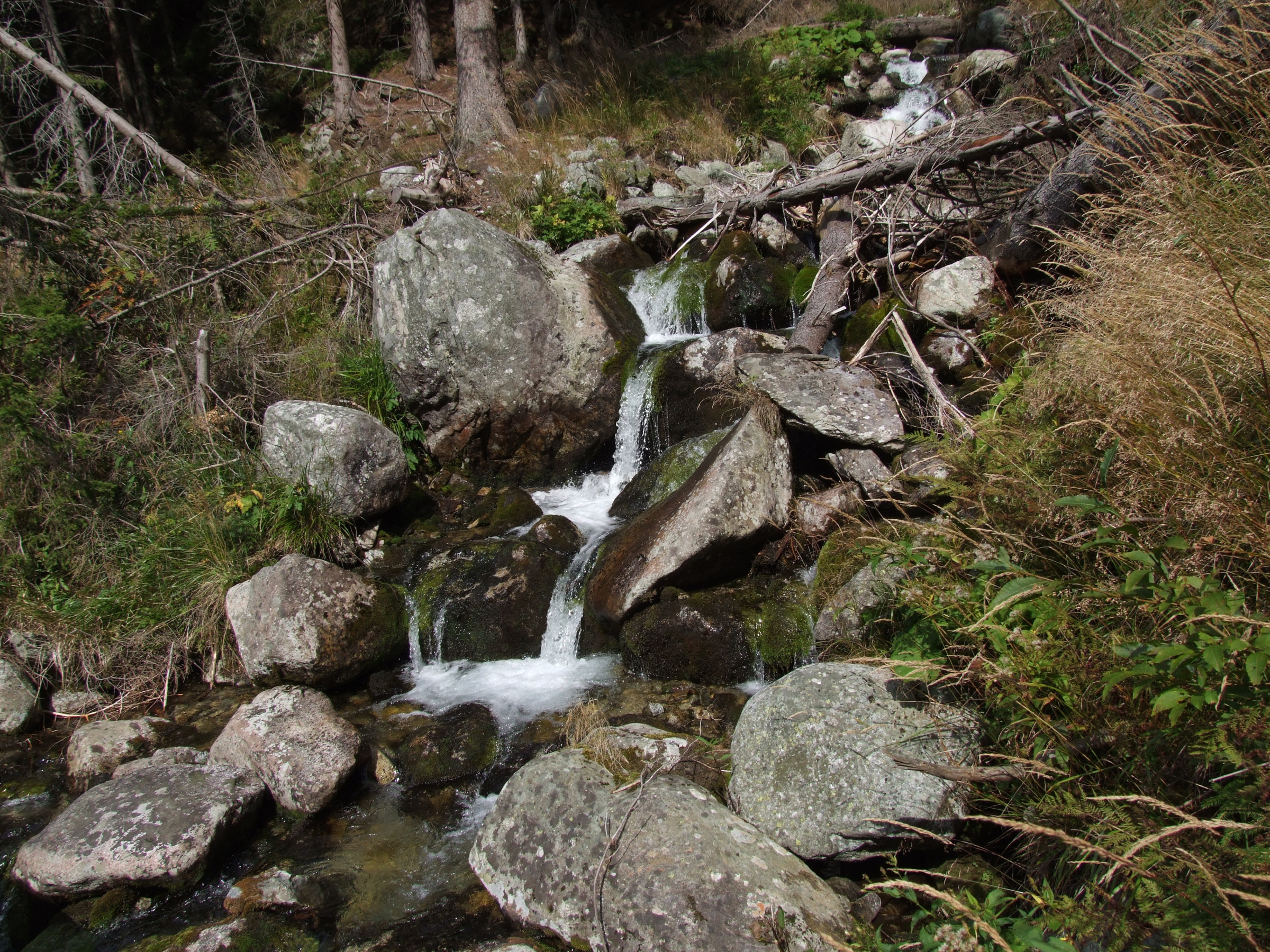 Głęboki Potok przy ujściu do Parzychwostu